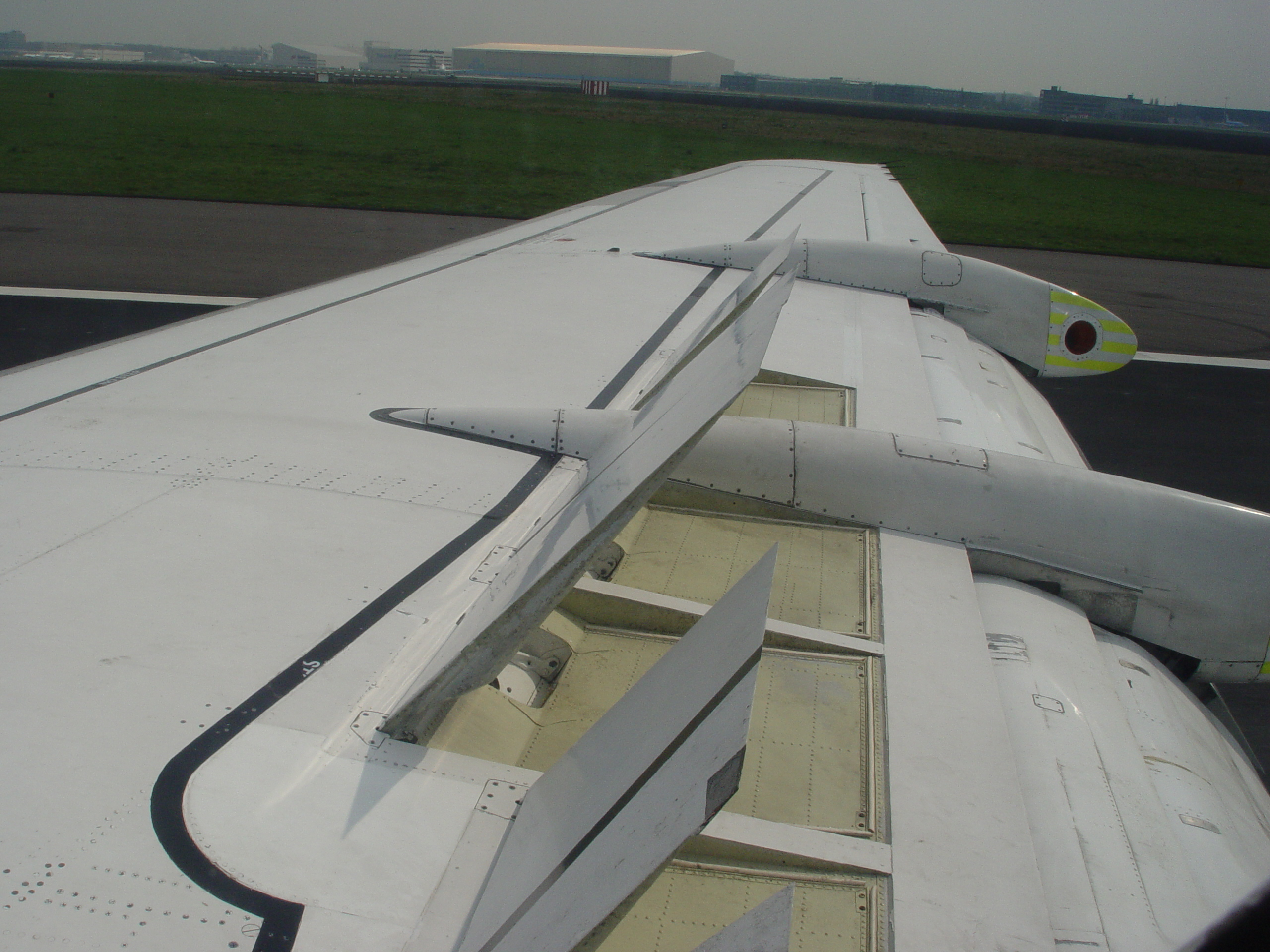 Luftbremse, (eingeklappte) Störungsklappen und (abgesenkte) Landeklappen bei der Landung eines Flugzeuges.